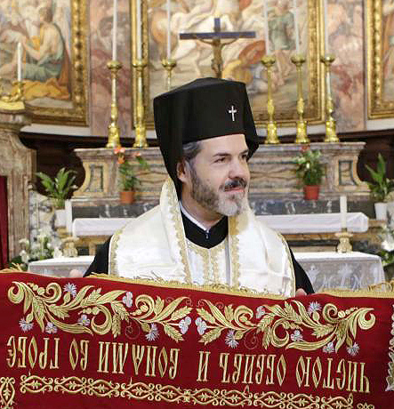 митрополит Западно- и Среднеевропейский Антоний на богослужении в Риме